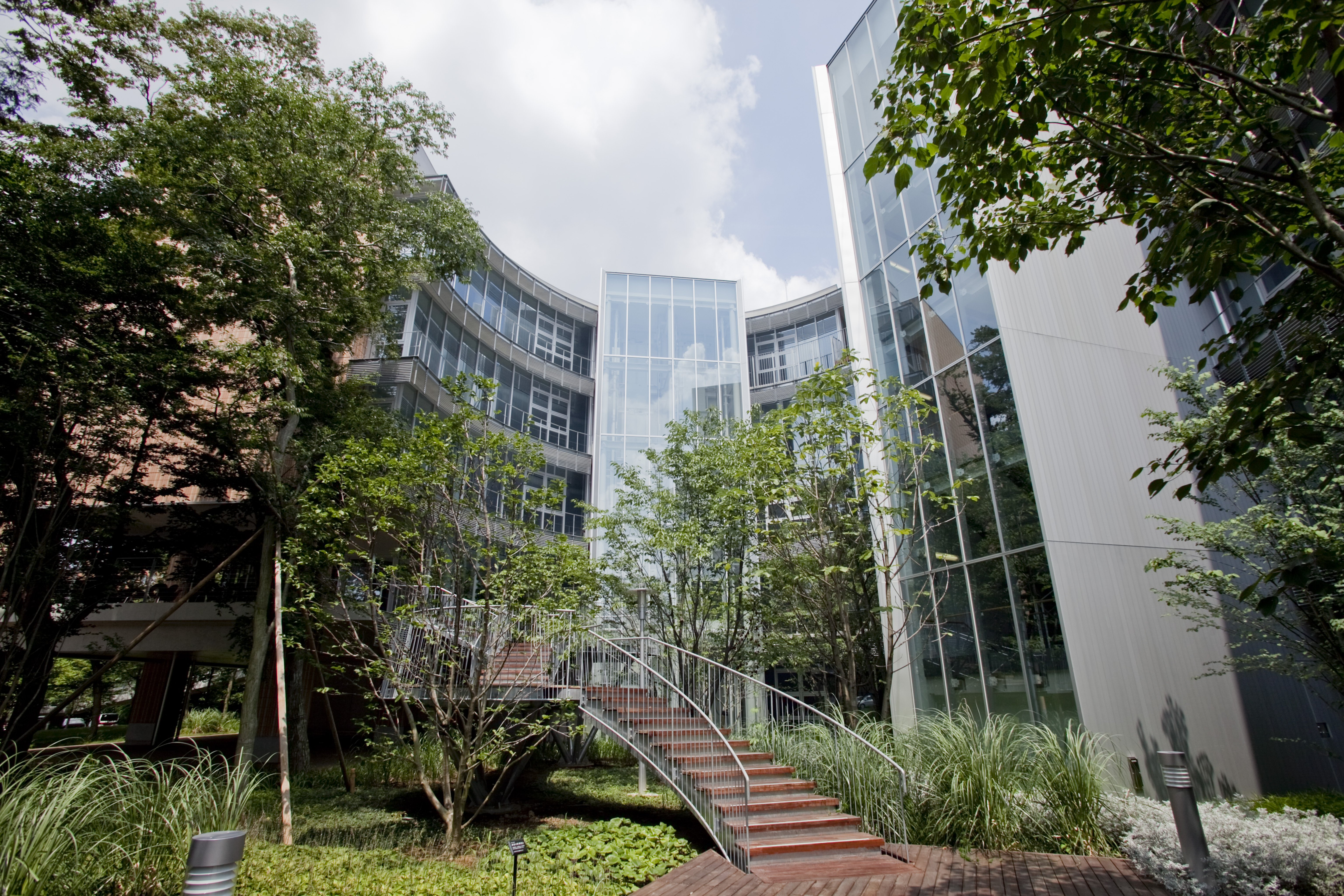 麗澤大学校舎「あすなろ」